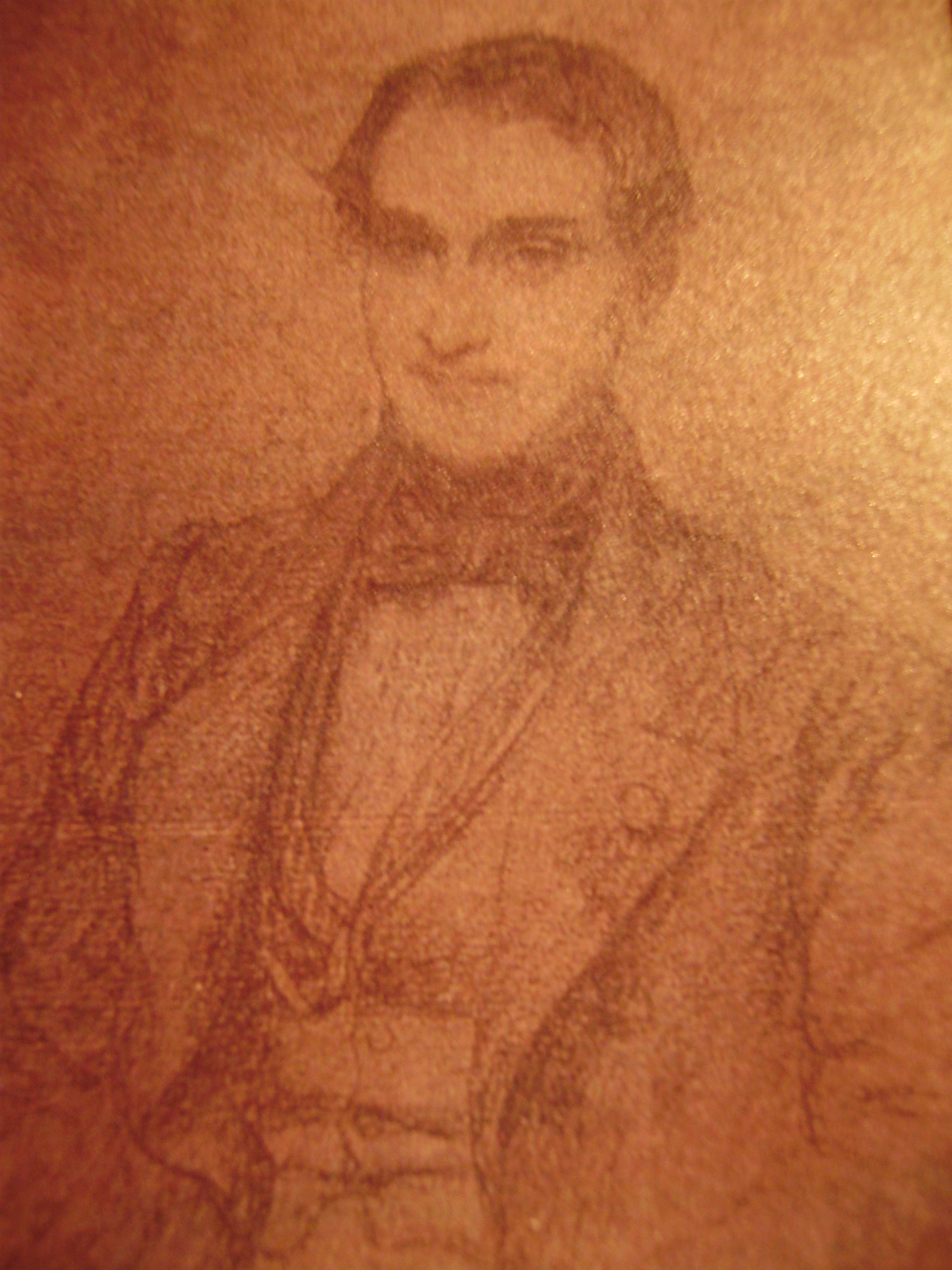 Alphonse du Bouëxic, comte de Guichen, propriétaire du Plantier de Costebelle